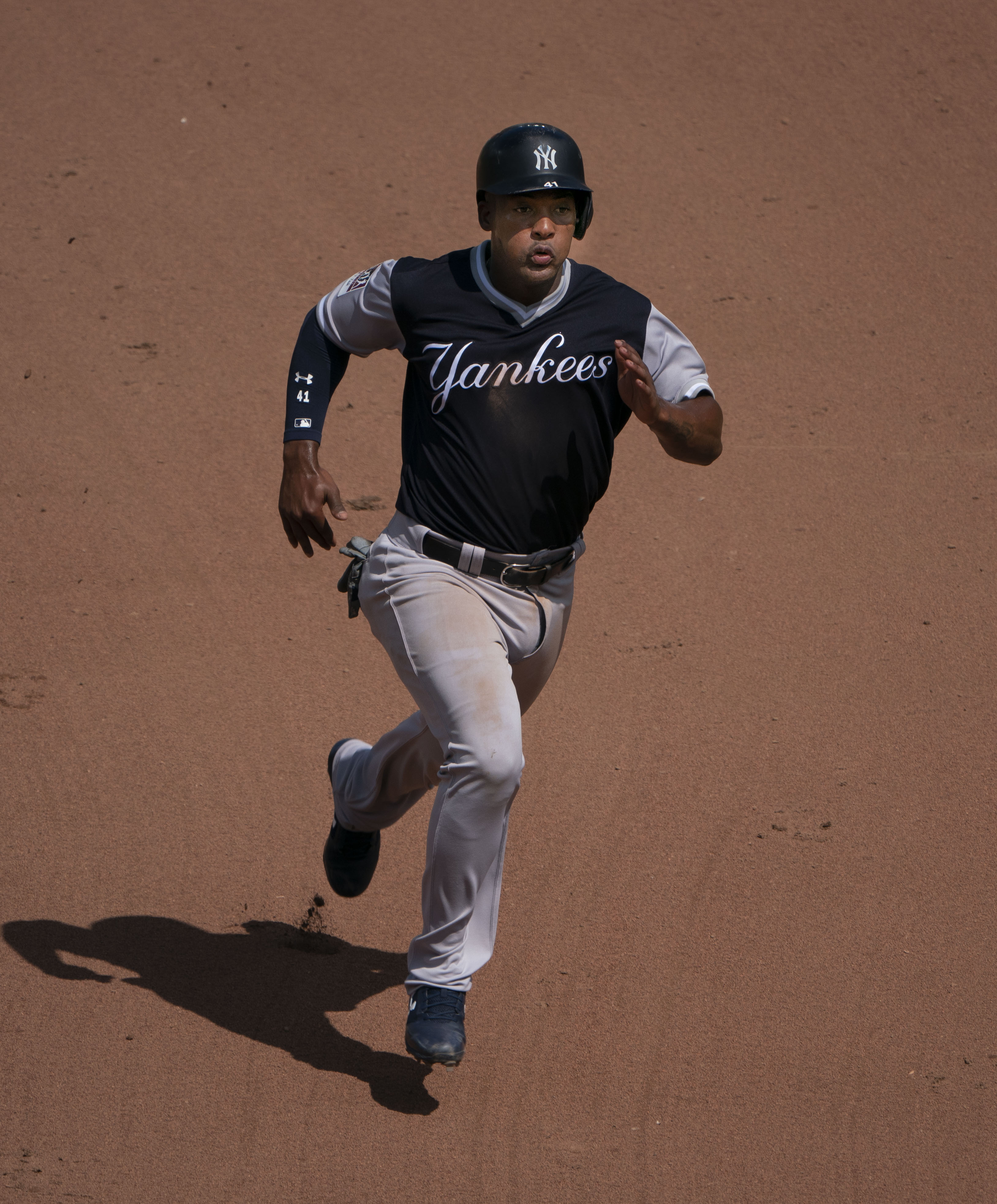 Yankees at Orioles 8/25/18